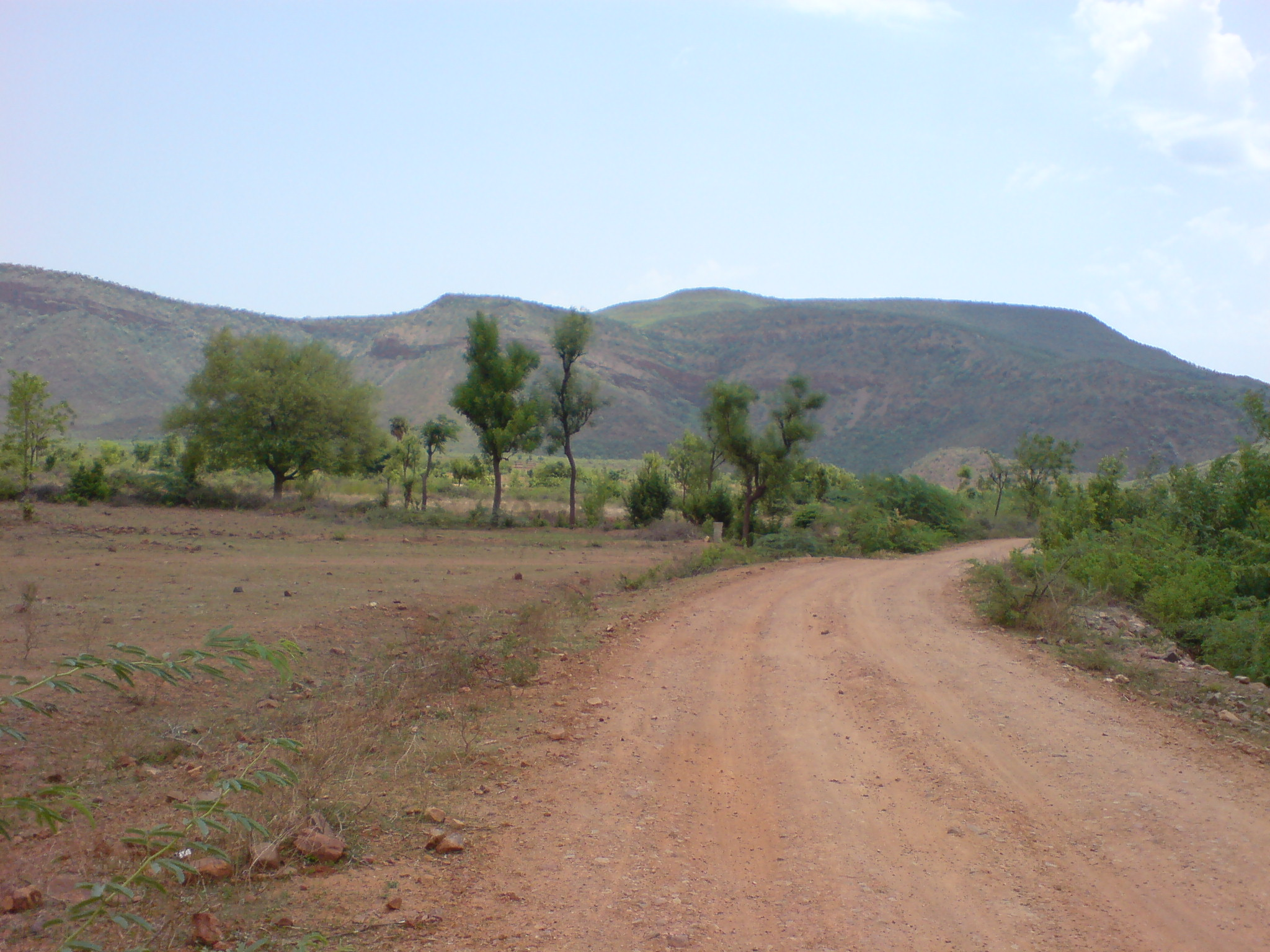 Palakonda, Veeraballi